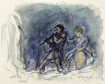 Szene aus Mozarts Zauberflöte (Papageno)